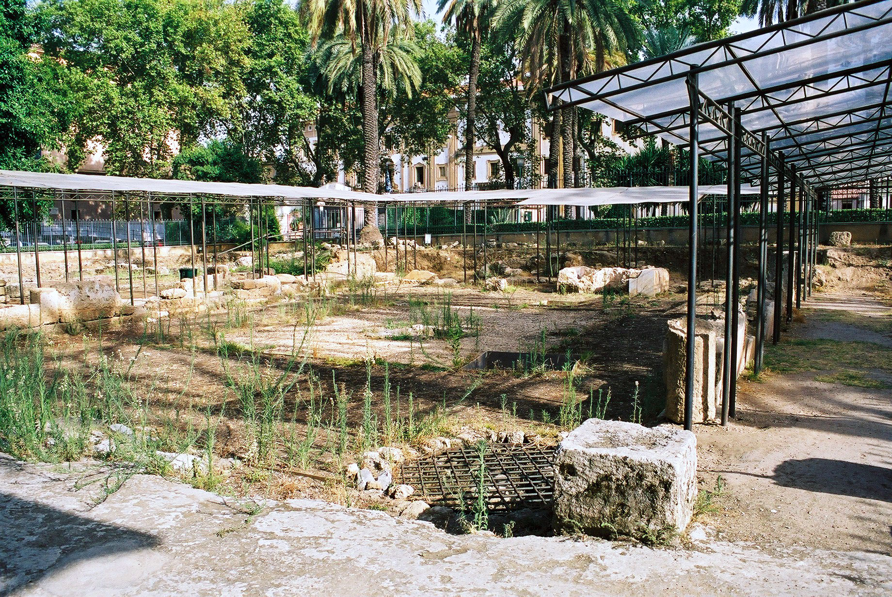 Piazza Vittoria, Palermo Excavations of Roman houses